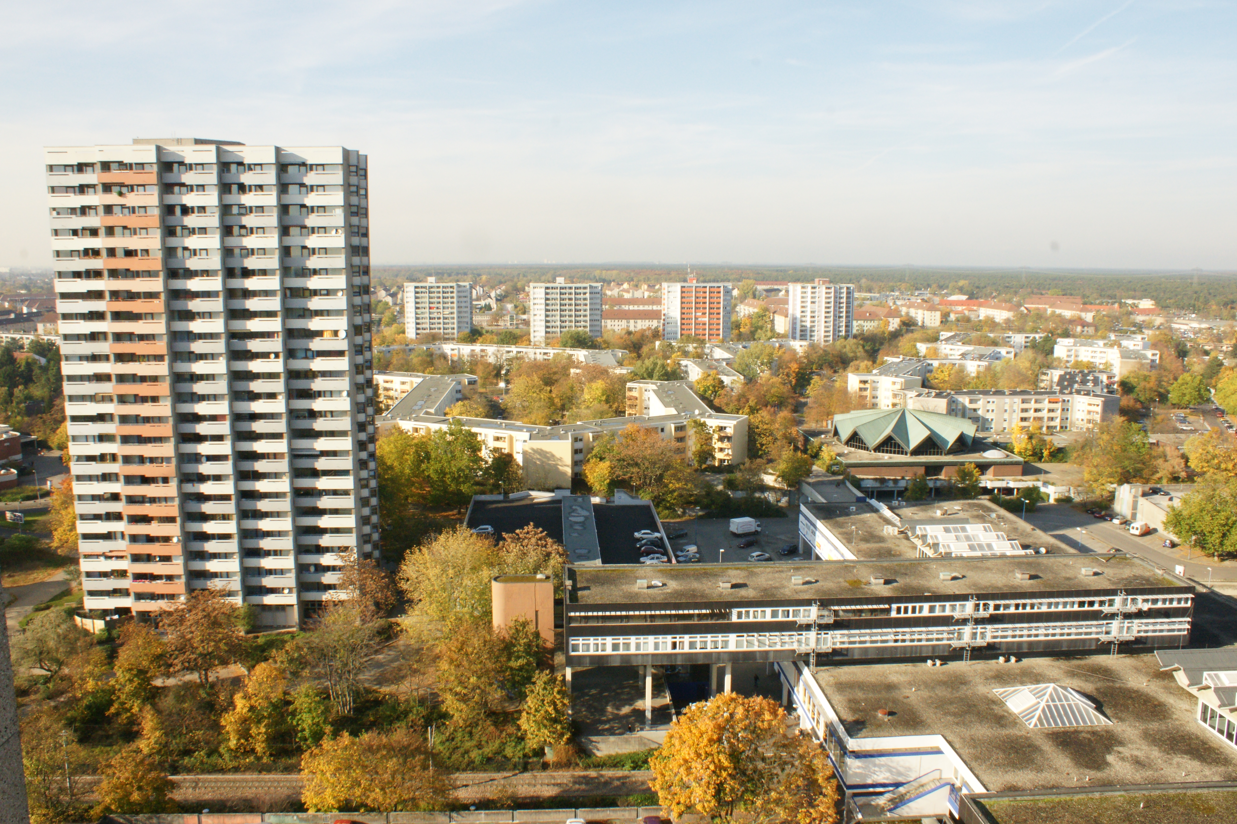 Mannheim-Vogelstang von oben, Blick auf die Brandenburger Strasse und die Thüringer Strasse vom Hochhaus des Freiberger Ring aus fotografiert.